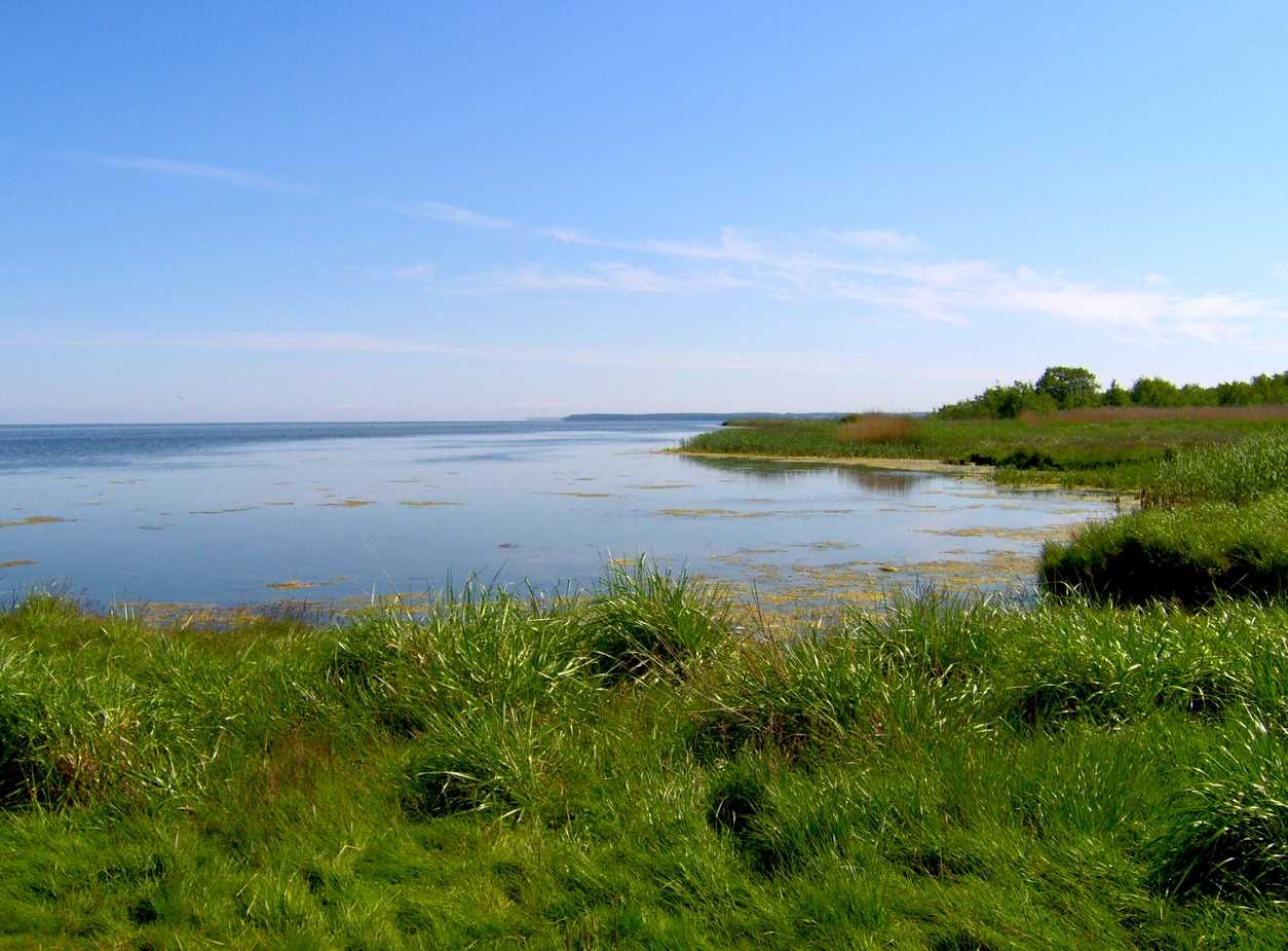 Bay of Puck - Baltic Sea, near the town of Władysławowo, southwards, Poland, spring of 2006 Zatoka Pucka - Słone Łąki - Nadmorski Park Krajobrazowy, wiosna 2006 Autor: Krzysztof Data: Wysłane na polską Wikipedię 13 lipca 2006 r.